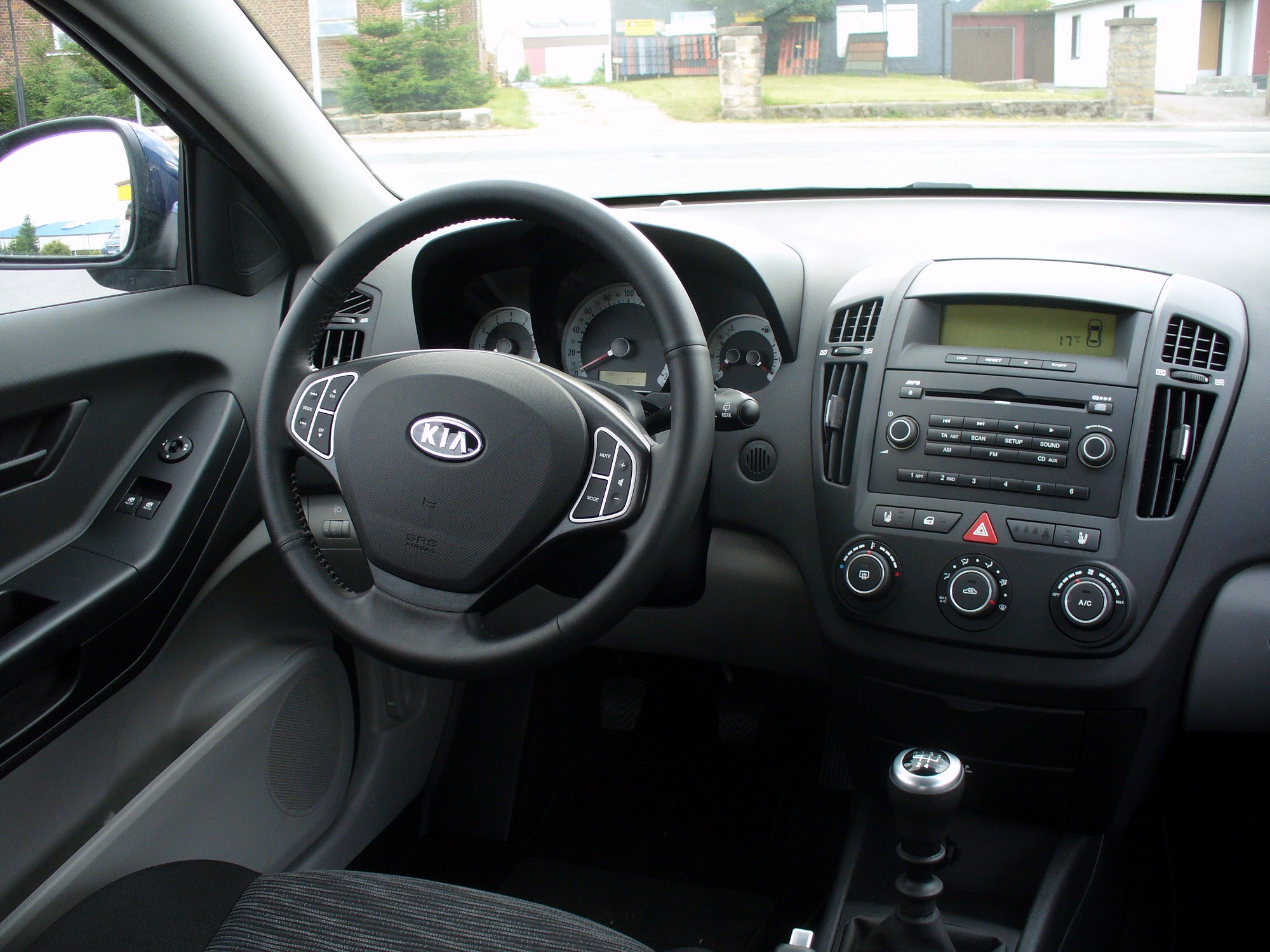 Kia pro_cee'd